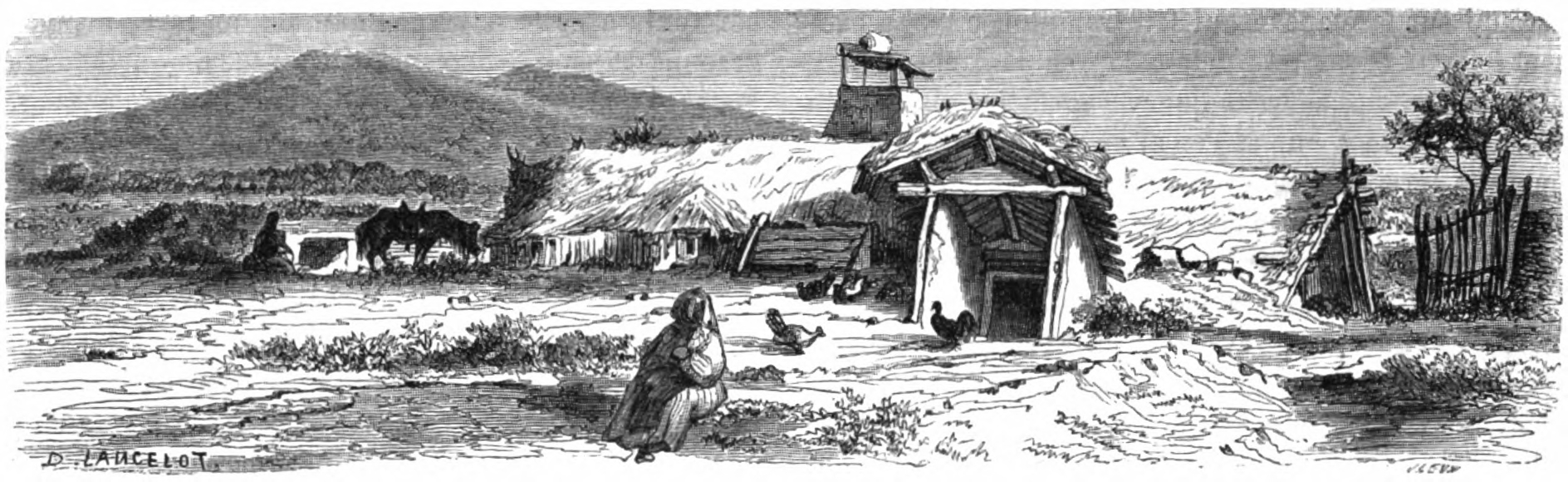 Une auberge